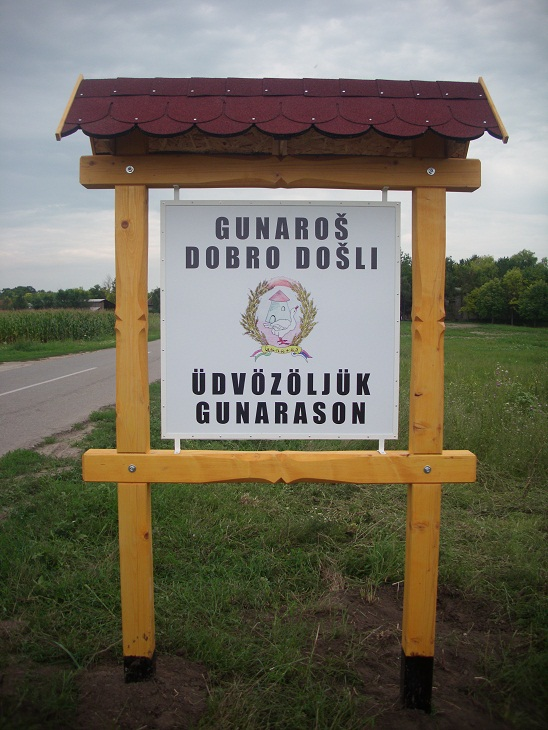 Gunaras üdvözlőtáblája